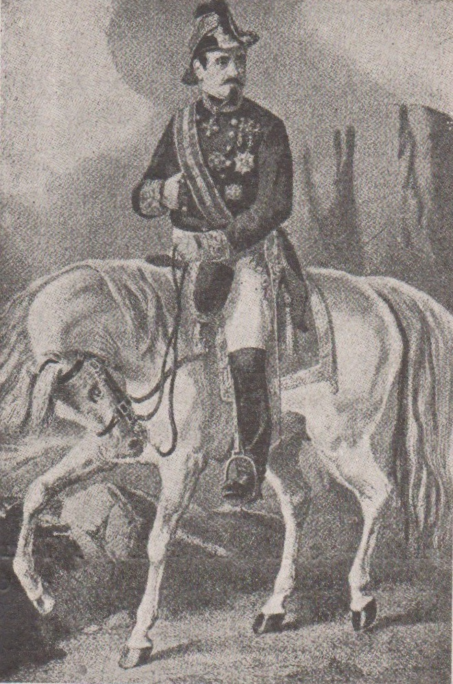 Juan Romagosa y Pros